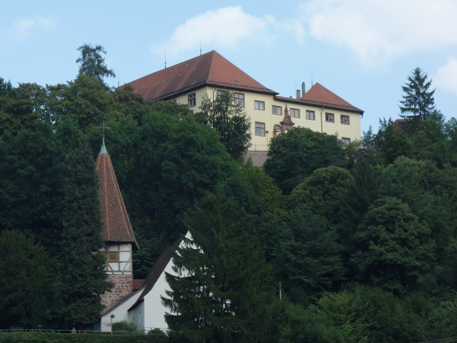 Schlossberg Schloss Neuenbürg und St. Georgskirche